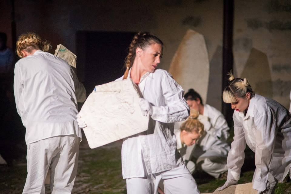 "Upravo stvoreno"